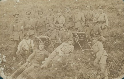 Войници от 3-та картечна рота при 24-и черноморски полк – Бургас.